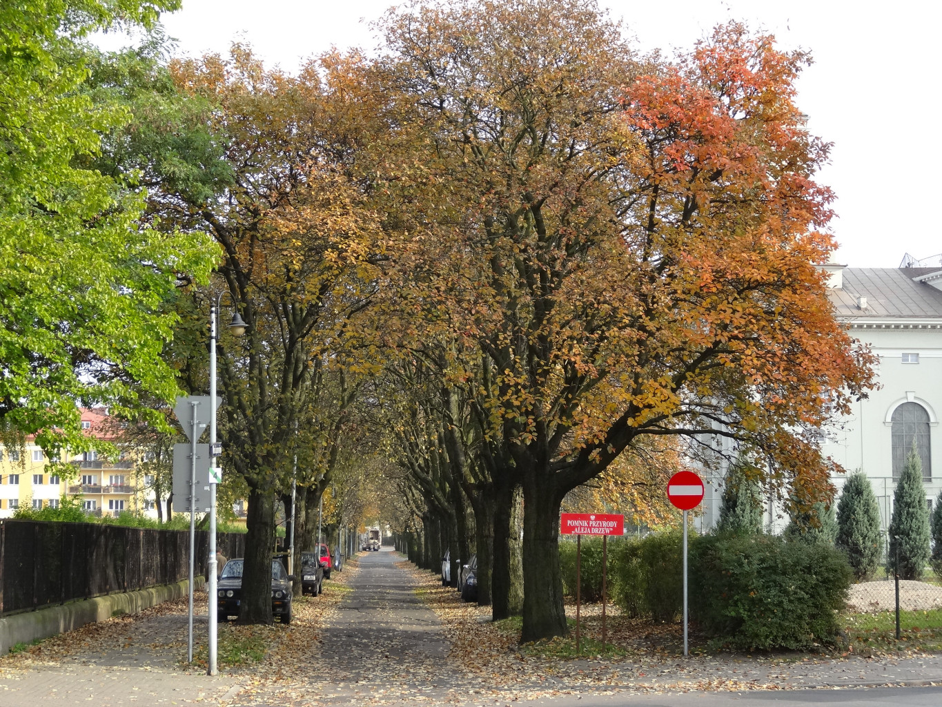 Aleja jarzębów szwedzkich ulica Szymanowskiego w Bydgoszczy - pomnik przyrody